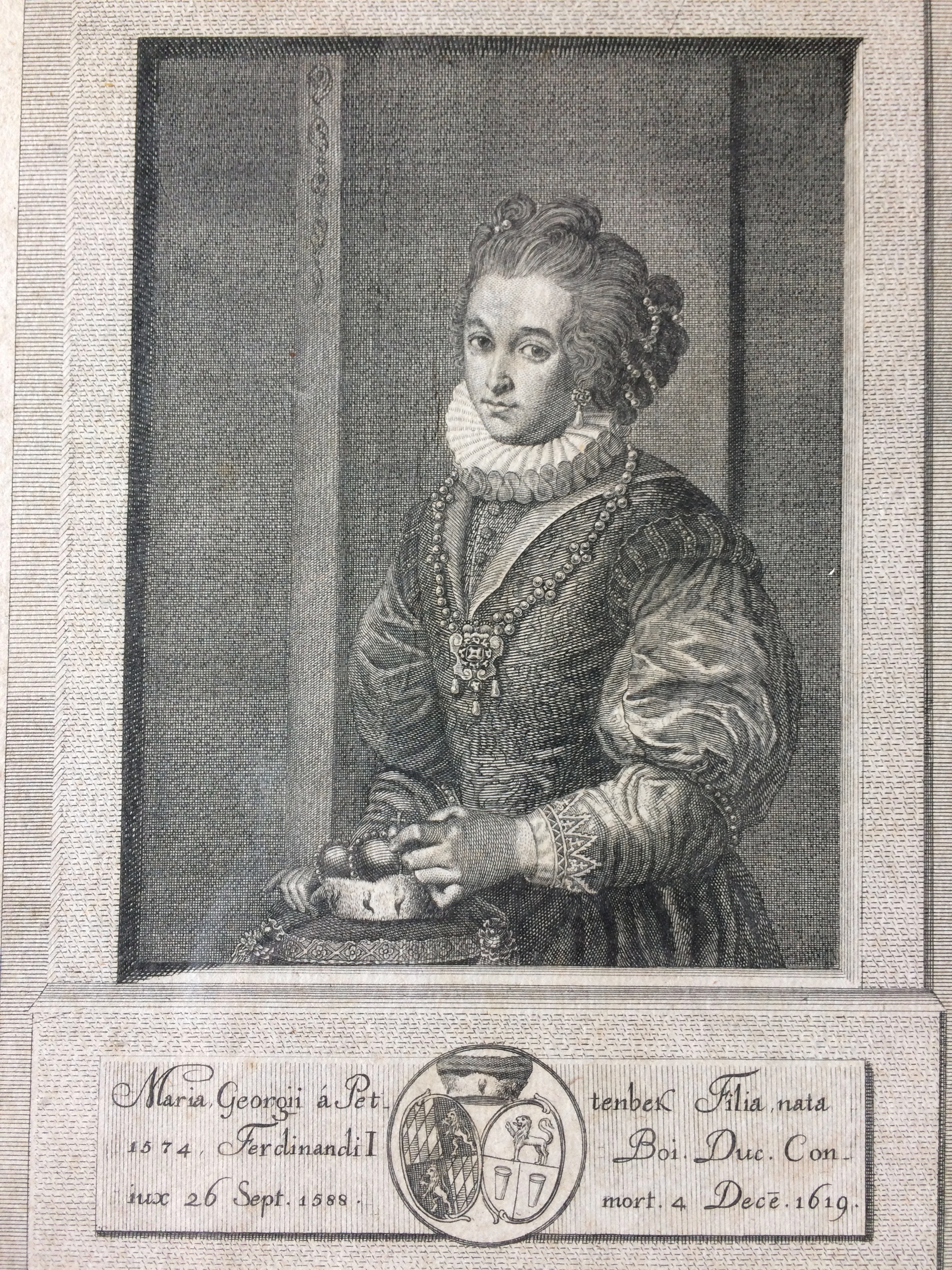 Kupferstich